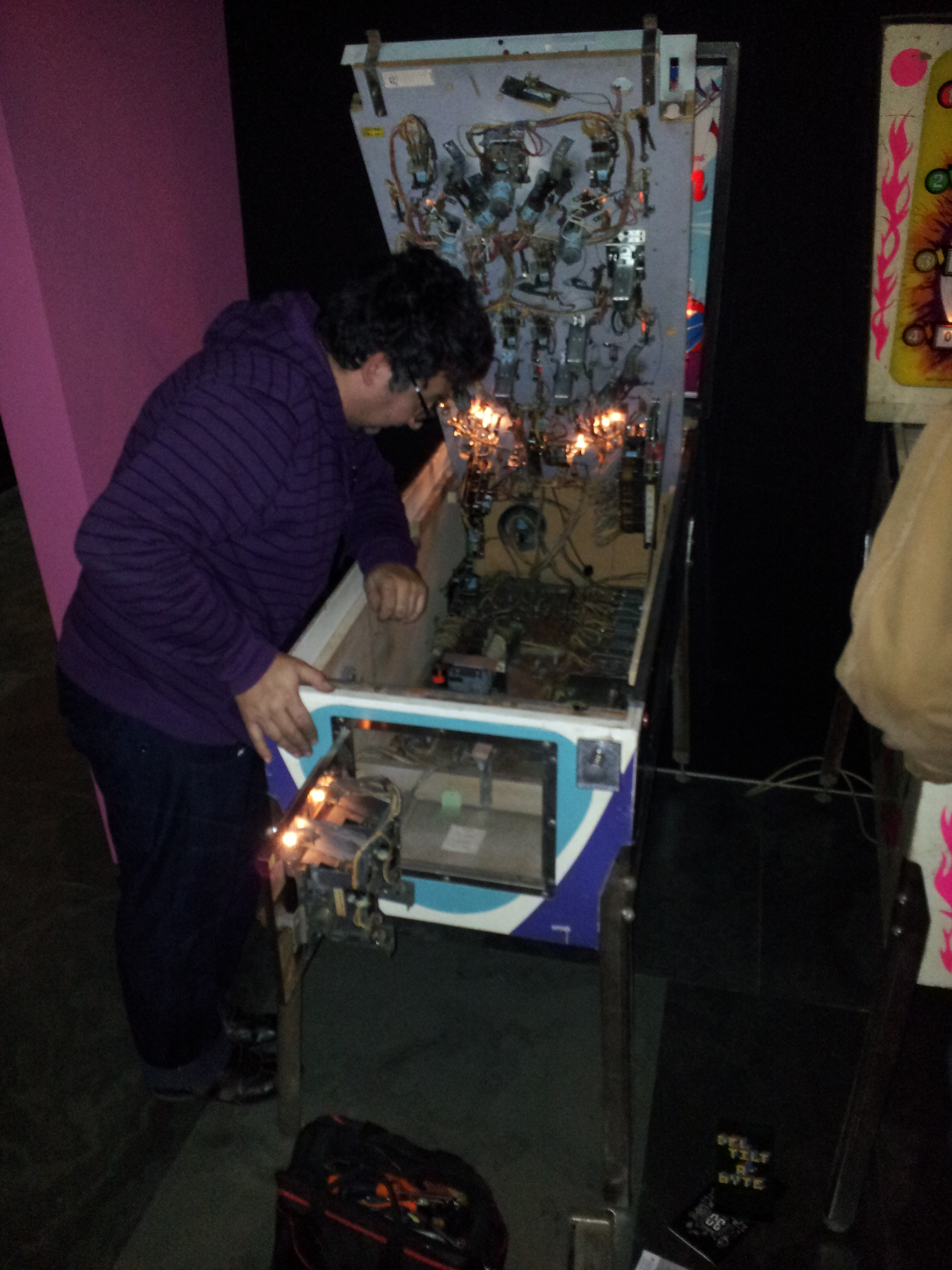 Reparació de màquina pin-ball (Seven-up, anys 60).